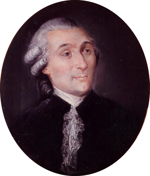 Tableau de Jean-Baptiste Treilhard (1742-1810).